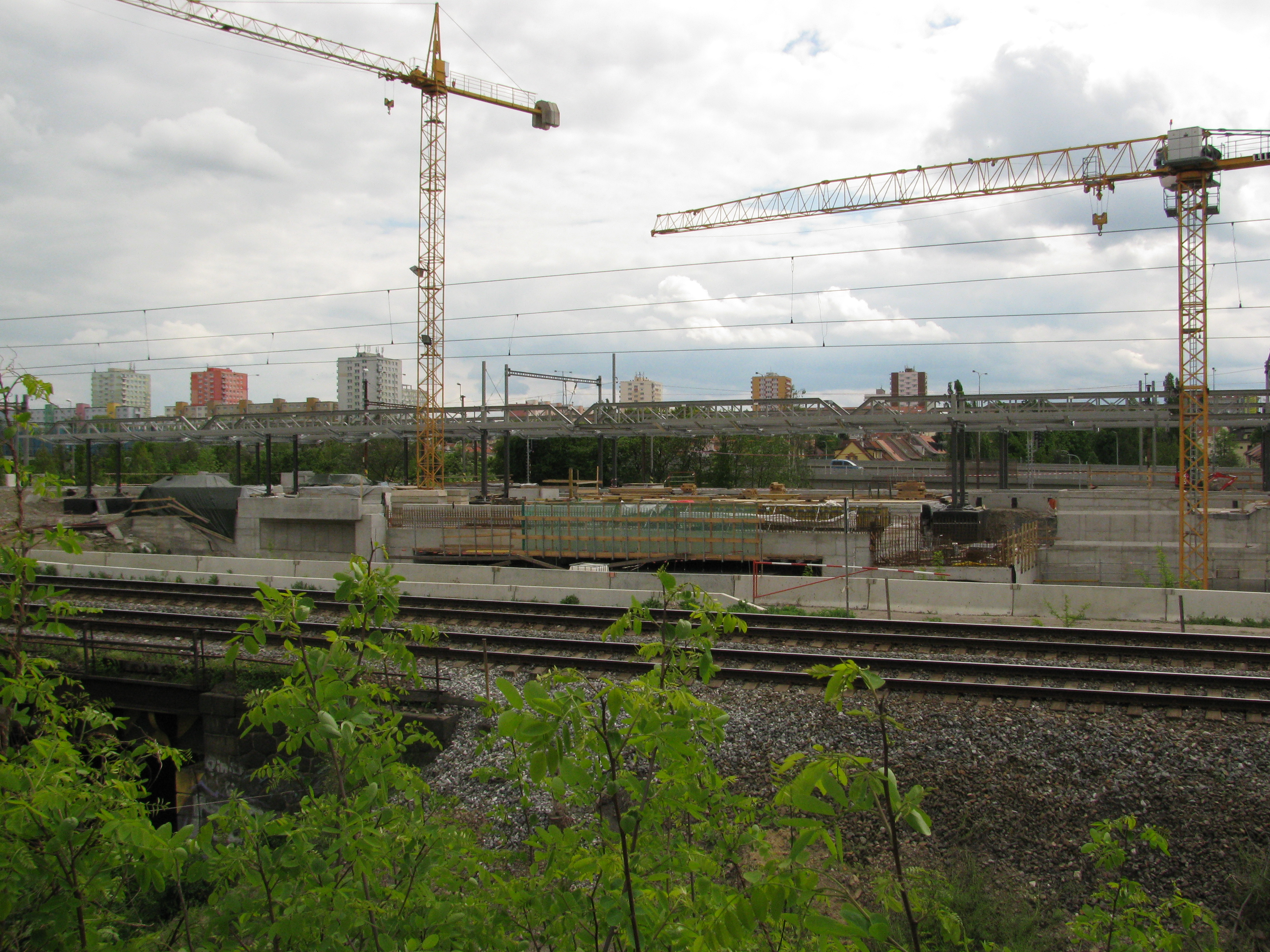 Stavba nádraží Zahradní město. Květen 2020. Na fotce jsou již vidět základy zastřešení nástupišť.